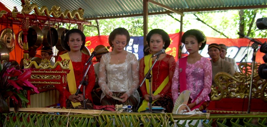 sinden cantik